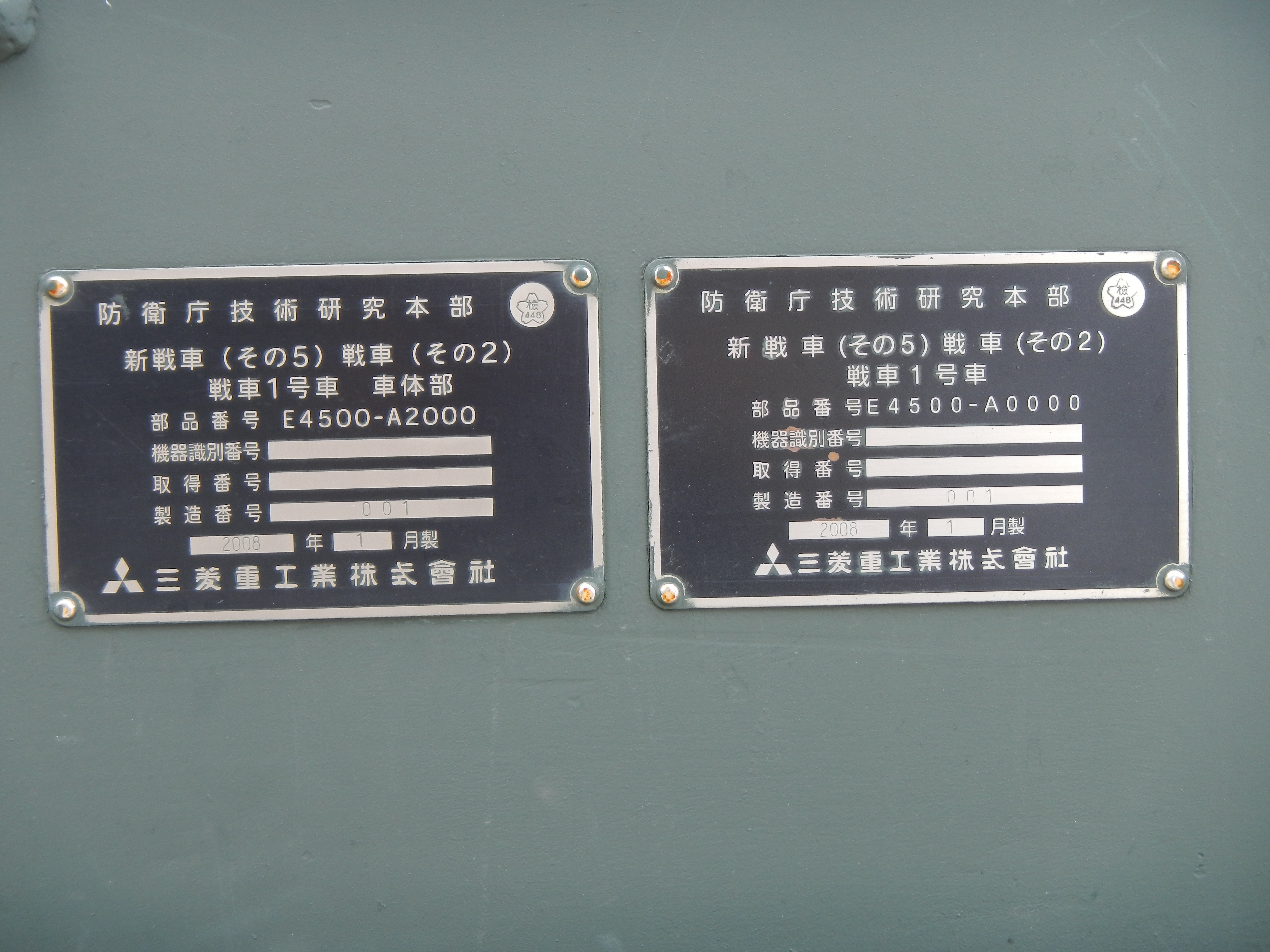 10式戦車（試作車）の銘板。陸上自衛隊広報センターの野外展示車。